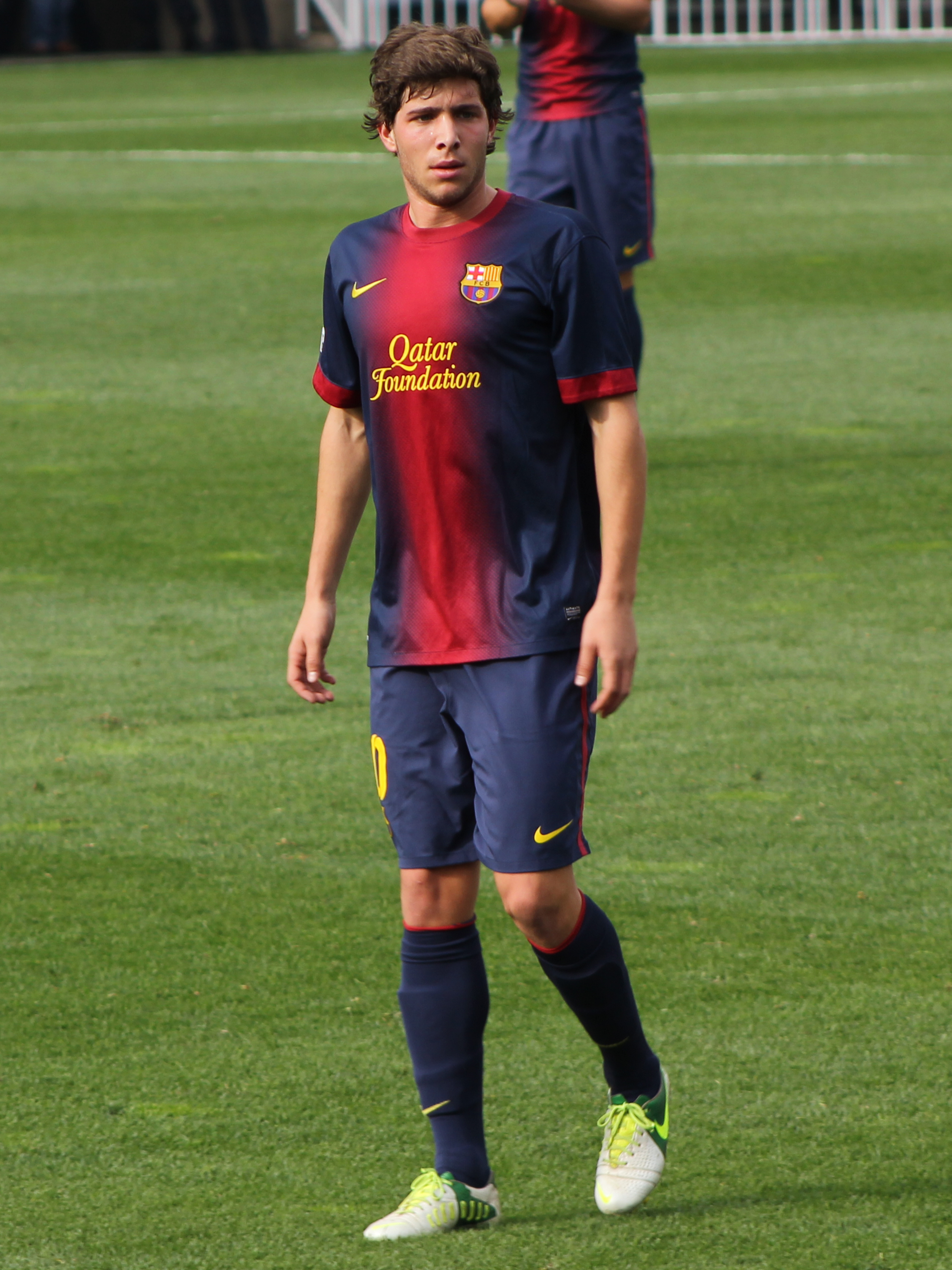 Foto realizada por Javier Segura (@castroquini en Twitter)